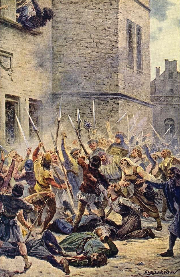 Adolf Liebscher (1857-1919) - Svržení konšelů s Novoměstské radnice 30. července 1419